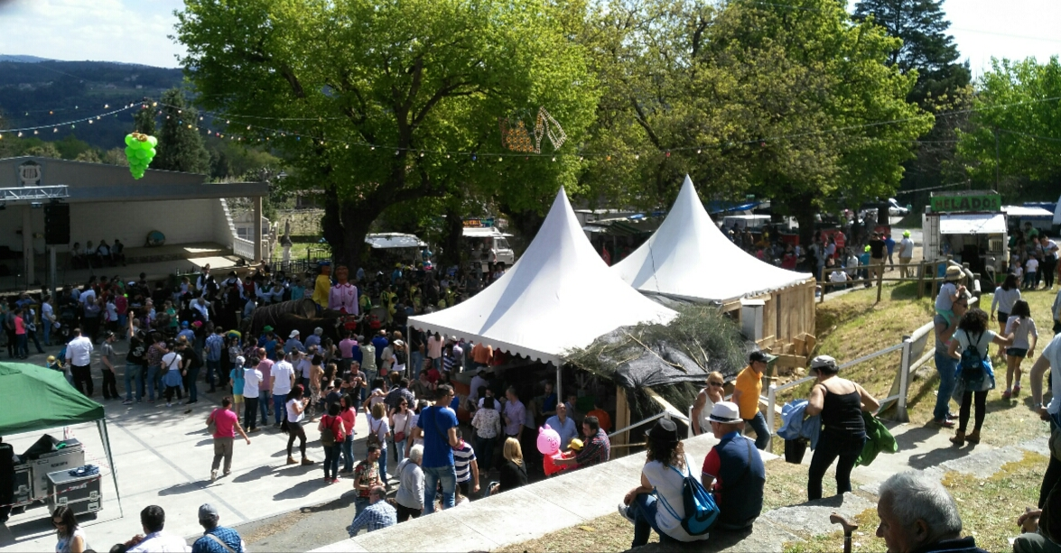 Festa do Viño da Ulla 2015